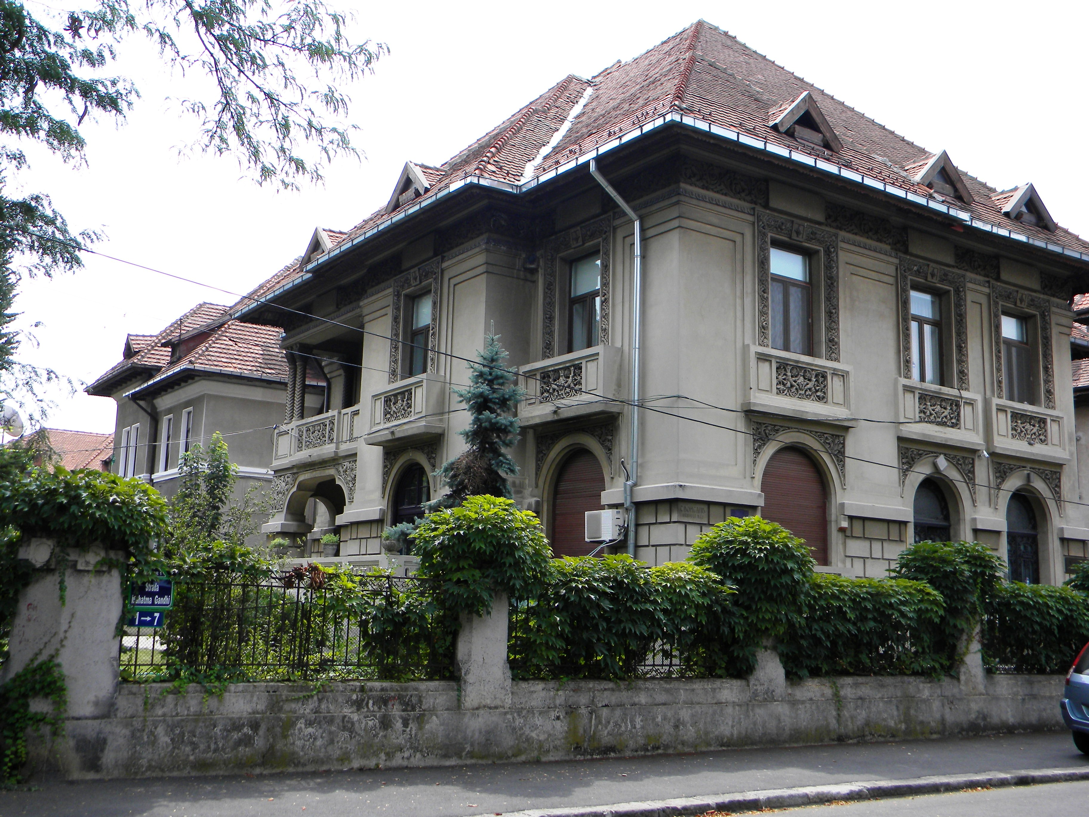 Casa pe Sos. Kiseleff, nr. 31 (imagine dinspre Str. Mahatma Gandi 1-7), Bucuresti, sect. 1.